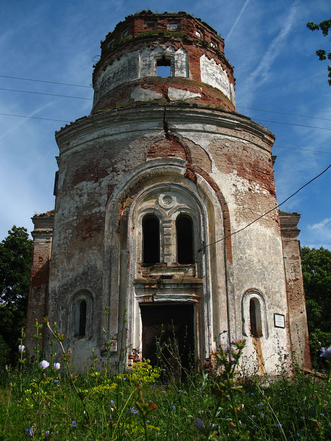 Беларуская (тарашкевіца): Астроўна (Astroŭna)